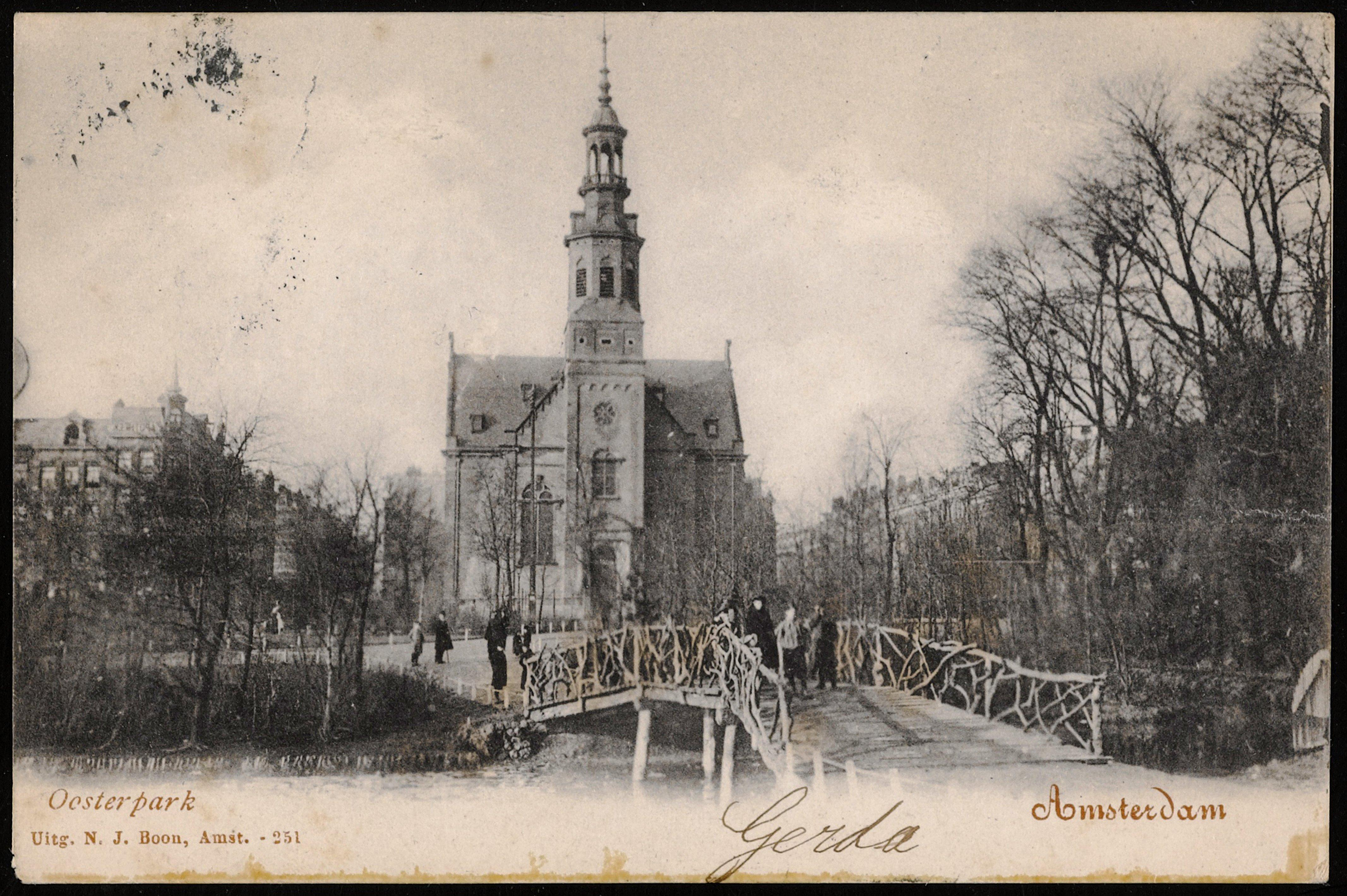 Beschrijving Oosterpark met op de achtergrond de Linnaeusstraat met Muiderkerk. op de voorgrond de oorsponkelijke brug 159. Uitgave N.J. Boon, AmsterdamDocumenttype prentbriefkaartVervaardiger Boon, N.J. (uitgever)Collectie Collectie Stadsarchief Amsterdam: prentbriefkaartenDatering 1902Geografische naam OosterparkInventarissen PRKBB00366000005 Generated with Dememorixer